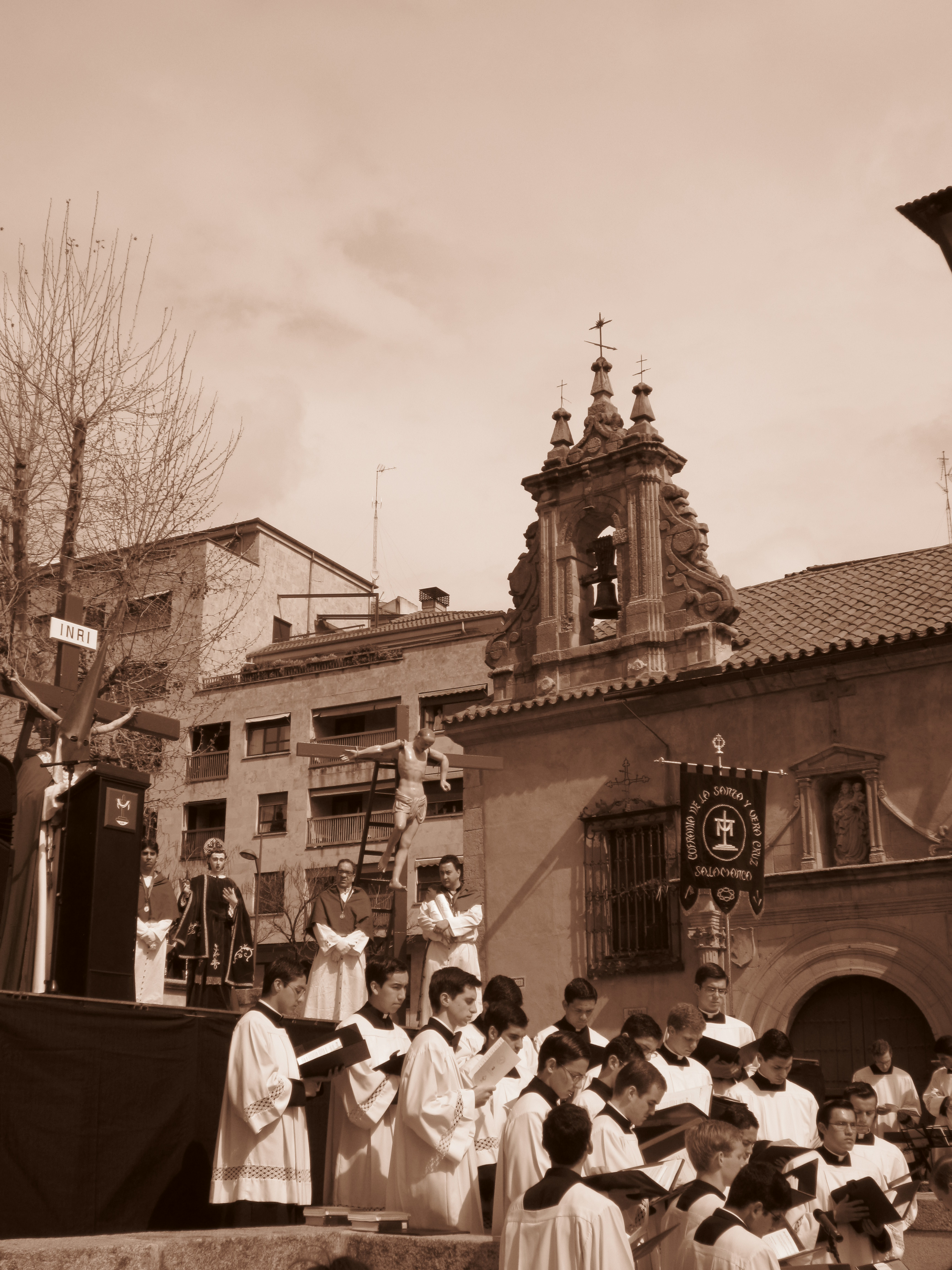 Semana Santa en Salamanca (España). Intervención del coro de religiosos durante la celebración del acto del Descendimiento, organizado por la Cofradía De la Vera Cruz en el Campo de San Francisco. .